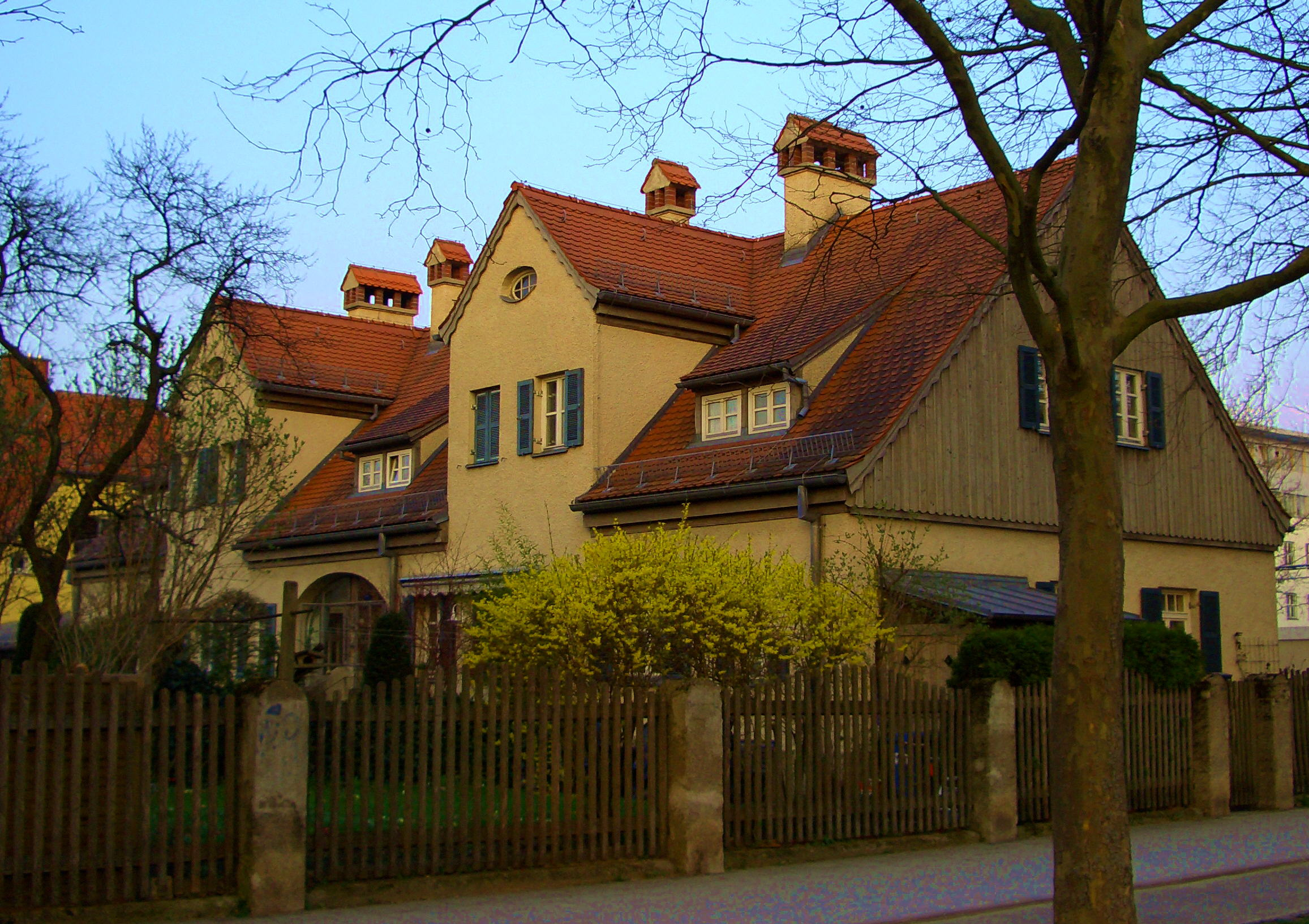 Barbarasiedlung in Muenchen-Schwabig-West, Doppelhaeuser, Gartenseite